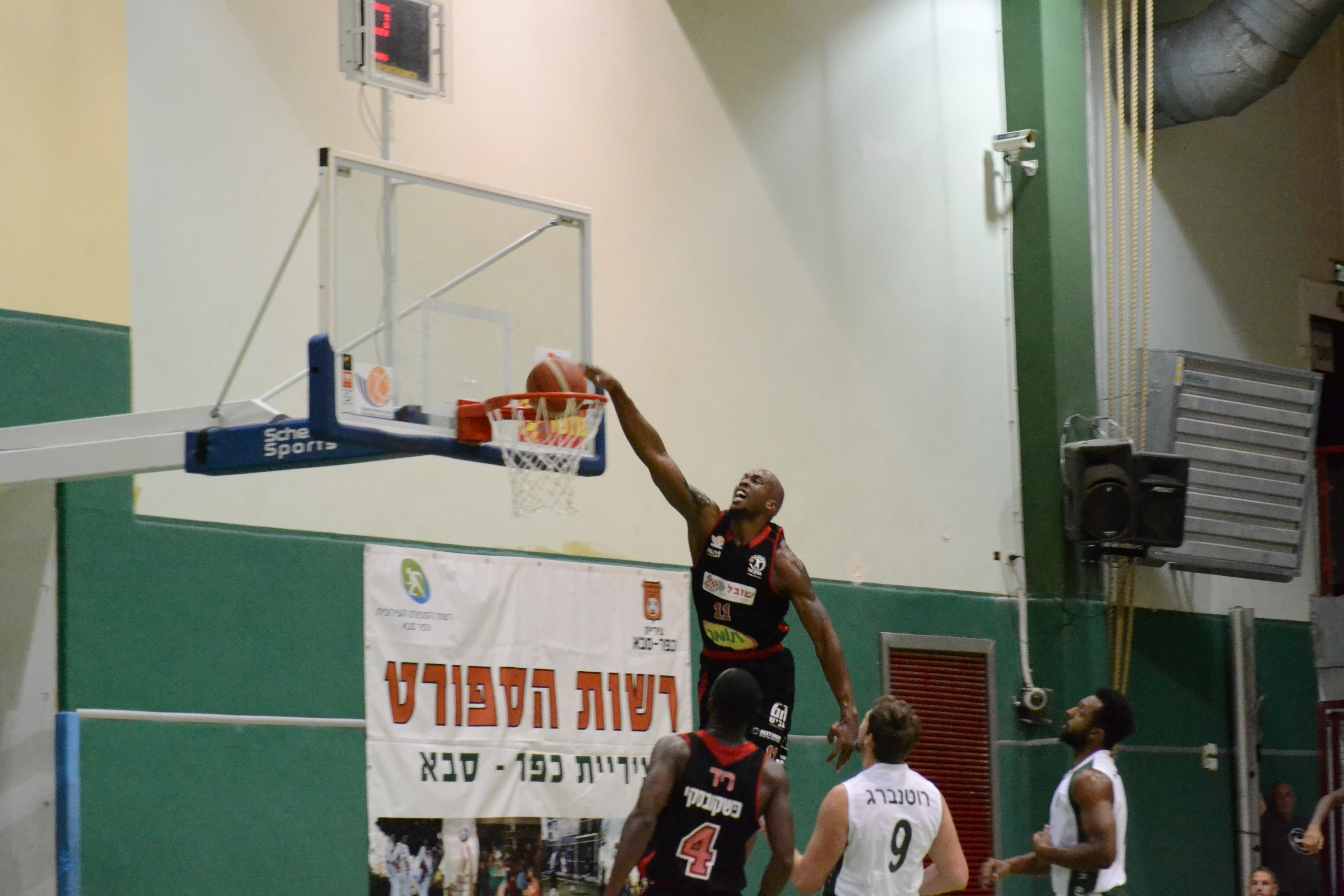 איסמעיל רומרו מטביע ישראל 2017